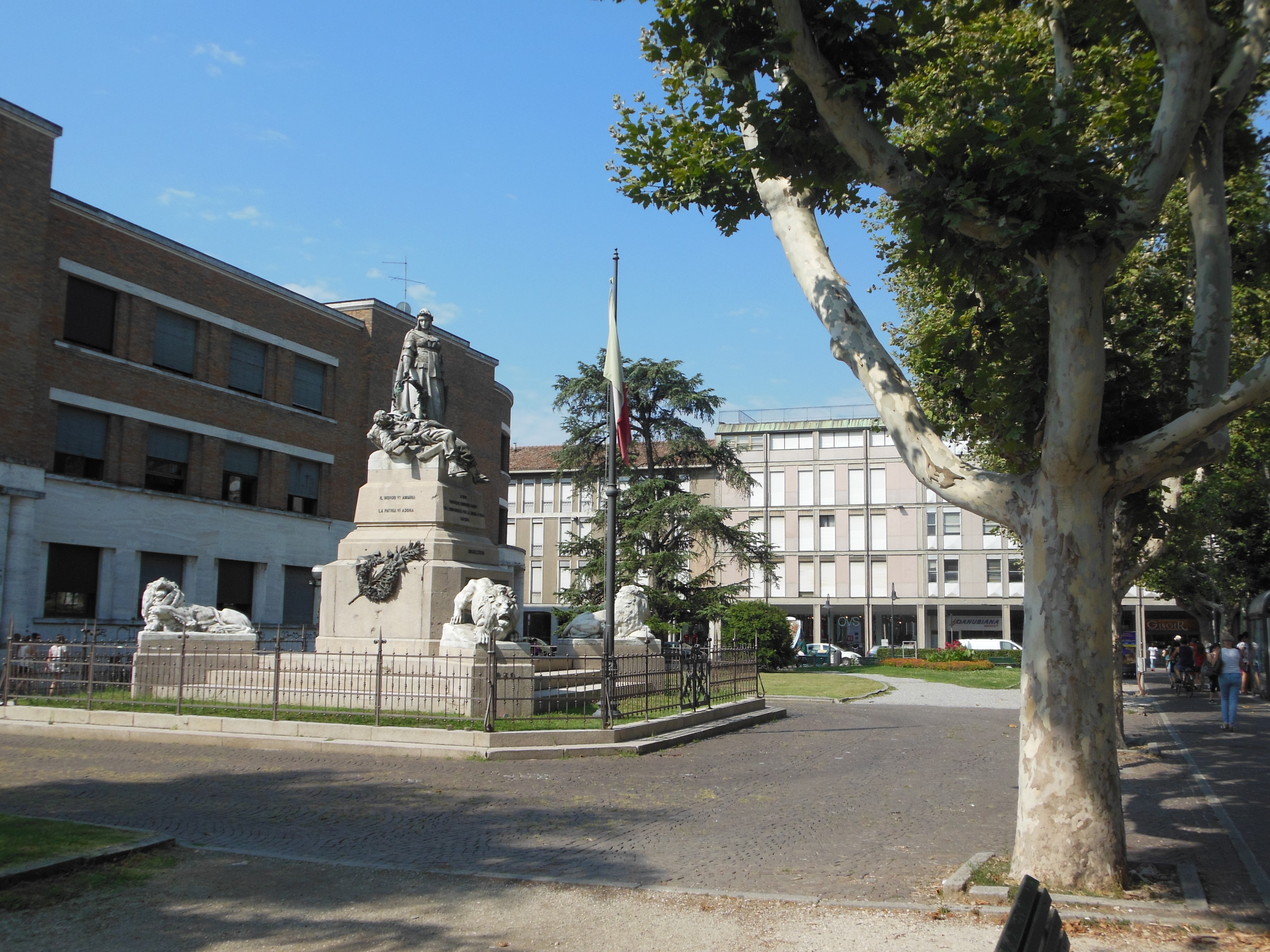 Ravenna, piazza Anita Garibaldi con monumento ai caduti